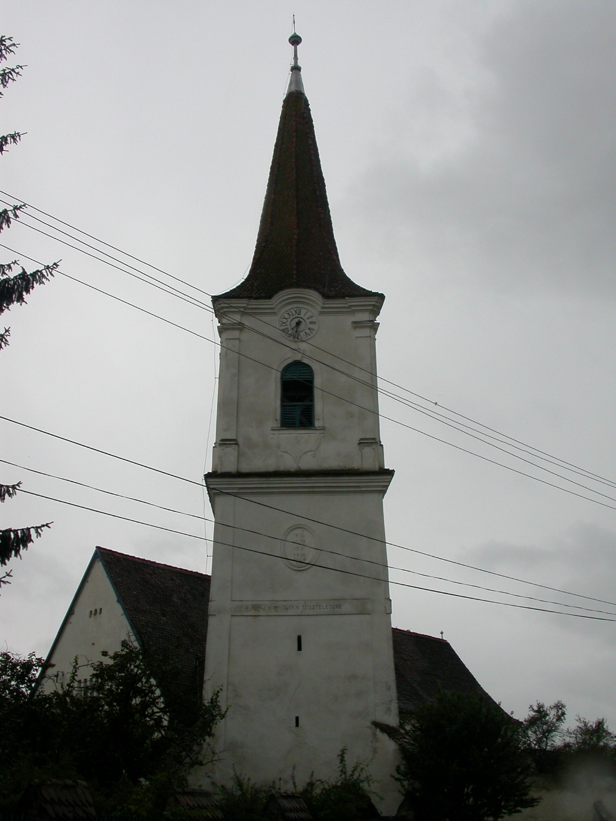 Ansamblul bisericii unitariene, sec. XIII-XX